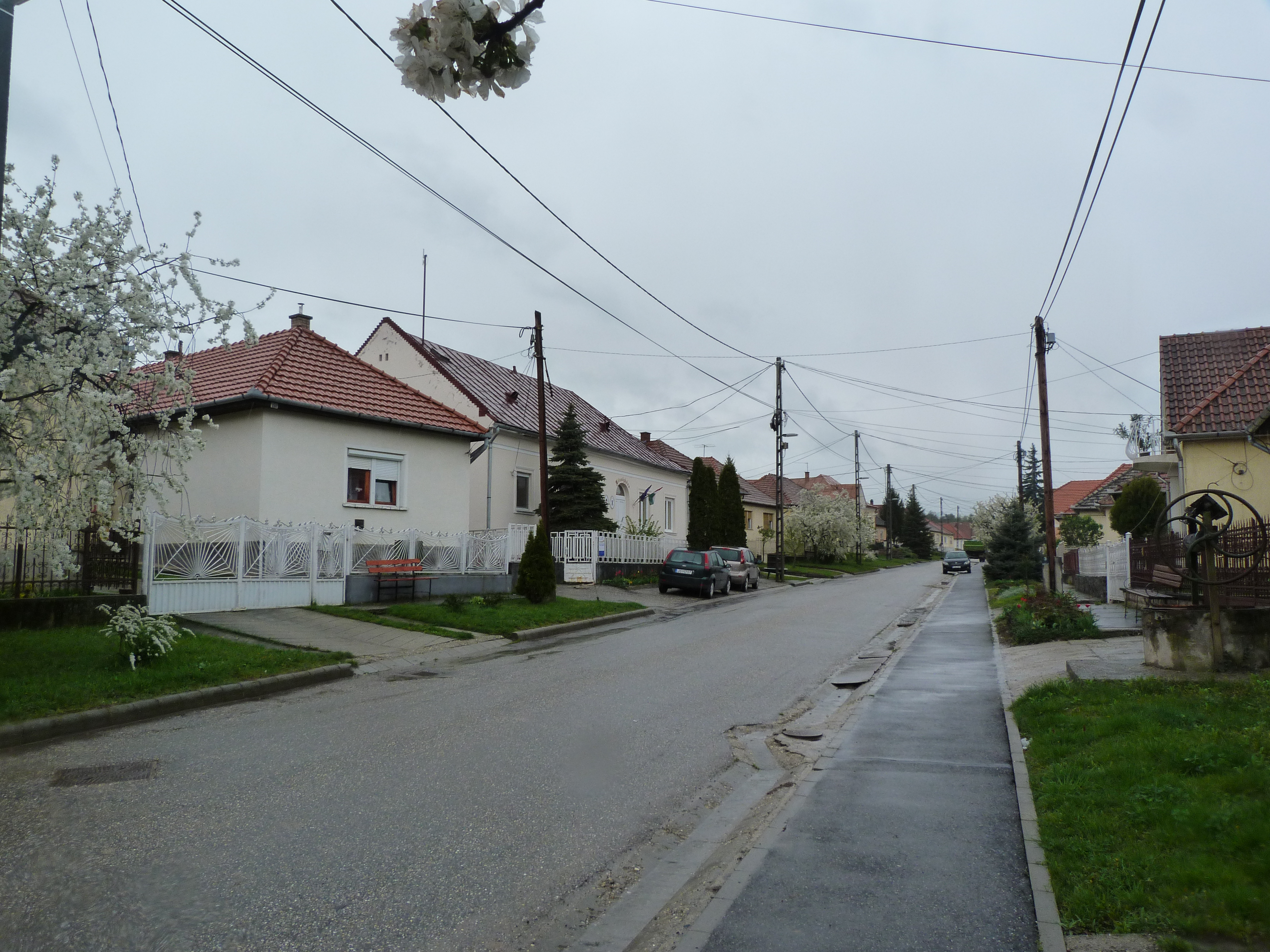 A felvétel 2014. április 9 -én, szerdán készült a Tokaj borvidéken, a Sárospatak melletti (északnyugatra, 3 km-re levő) Hercegkúton. Egész délelőtt szemerkélt az eső, a szél is fújt. ©© Derzsi Elekes Andor, Budapest, 2014, A kép és filmfelvételek egészben, vagy részletekben másolását, bármilyen úton történő sokszorosítását és felhasználását a szerző ellenérték nélkül, jogutódjaira is kihatóan megengedi. Az engedély kiterjed a kereskedelmi célú hasznosításra is. Kéri azonban nevének feltüntetését a felhasználás során. A Metapolisz sorozat valamennyi képe és filmje Creative Commons alatti valamint kereskedelmi - for profit - célra is felhasználható. Ajánlott hivatkozás: Derzsi Elekes Andor: Metapolisz DVD line